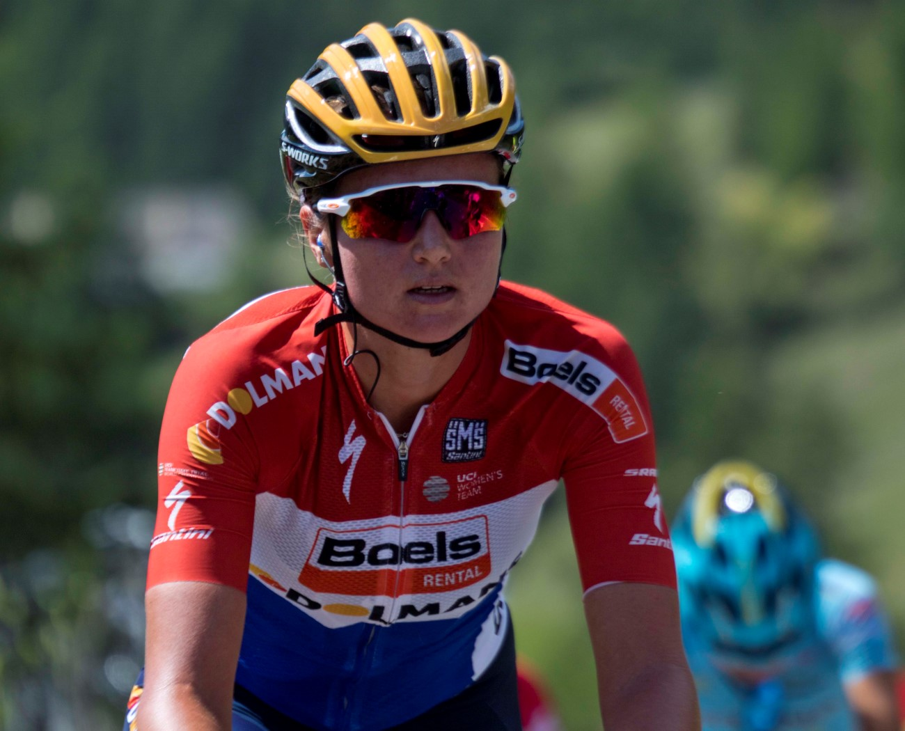 Chantal Blaak op de Col d'Izoard tijdens de eerste etappe van La Course 2017